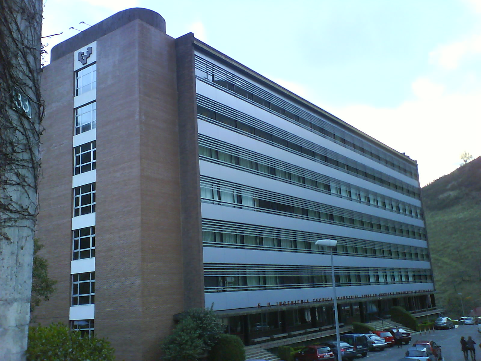 Edificio docente de la Escuela Universitaria de Ingeniería Técnica Industrial de Eibar (Guipúzcoa) País Vasco (España).